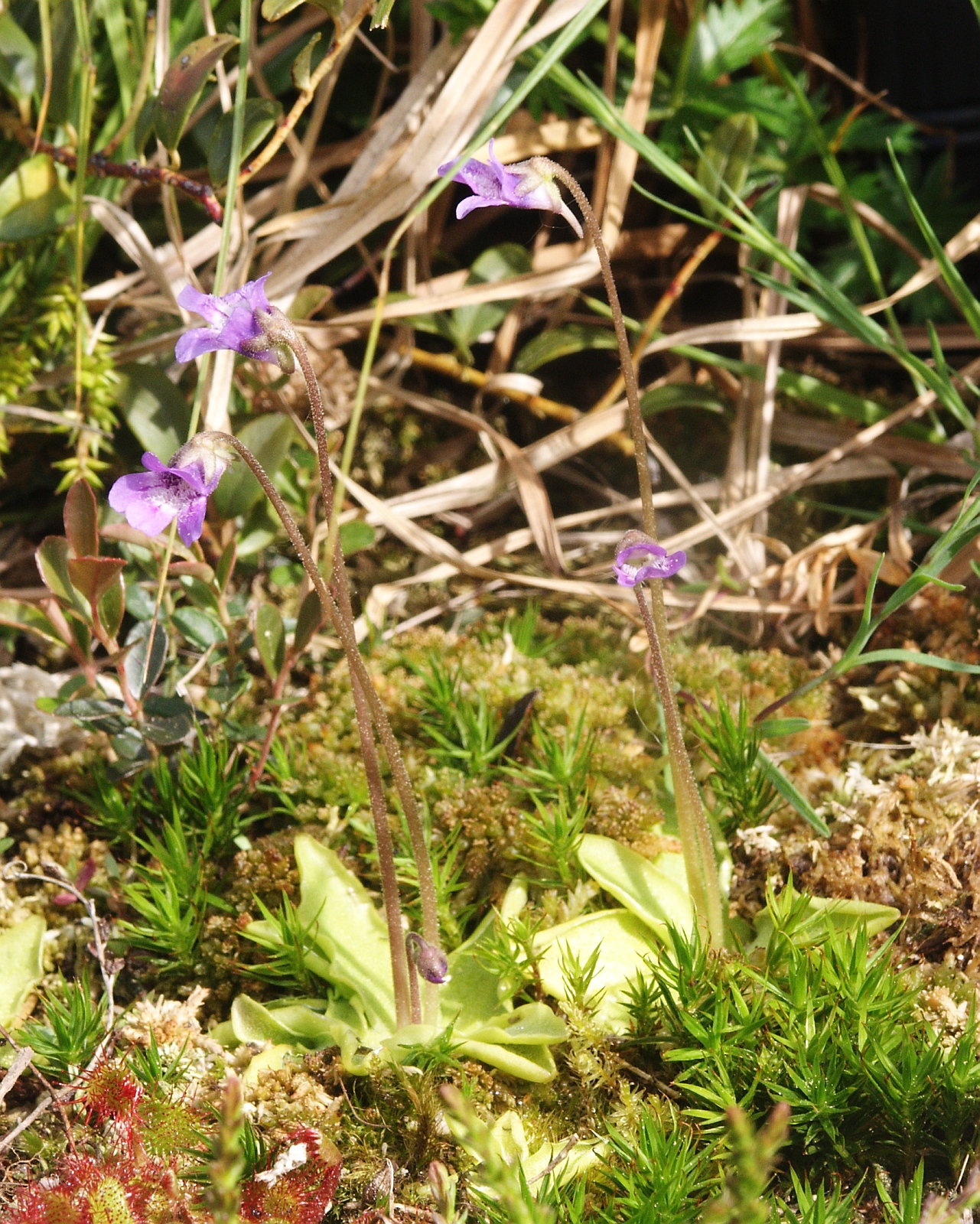 Pinguicula vulgaris as a garden plant